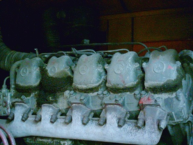 台糖德馬B型機車所用的Benz OM403V十汽缸引擎